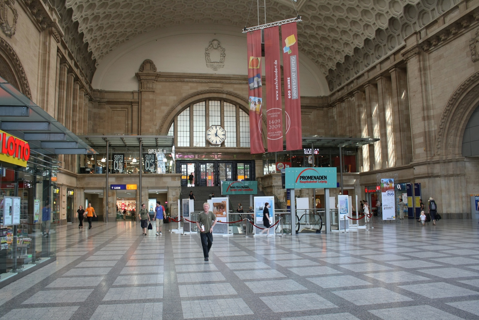 Leipzig Hauptbahnhof Westhalle.